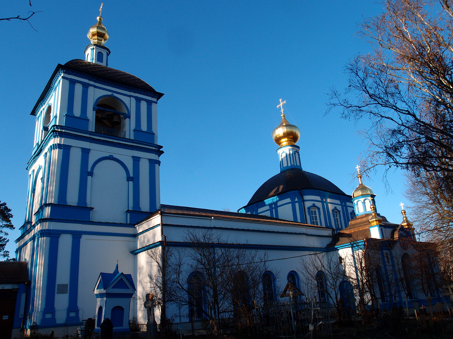 Церковь Успения Пресвятой Богородицы (Москва и Московская область, Солнечногорск, село Обухово)